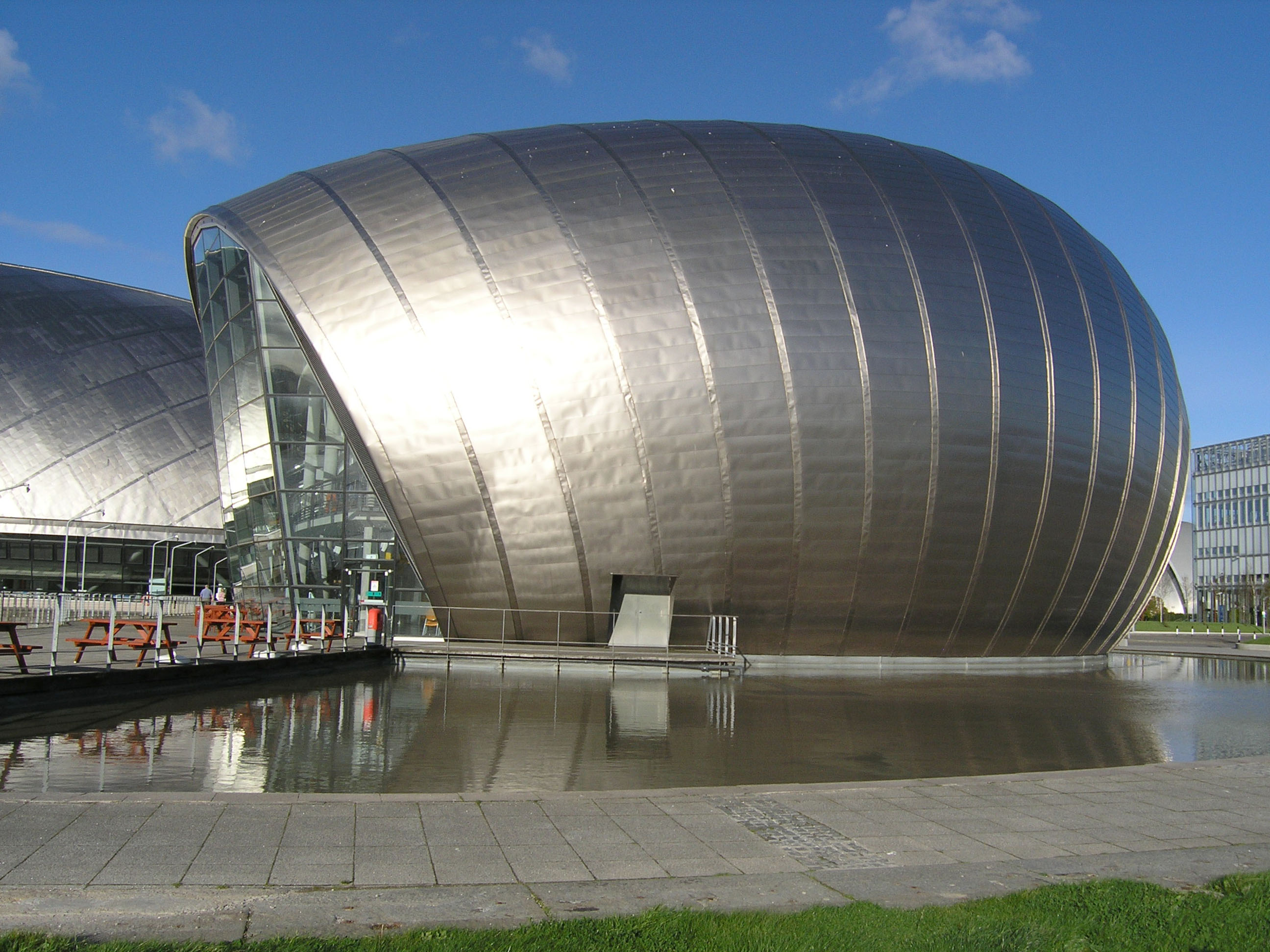 Glasgow Science Center